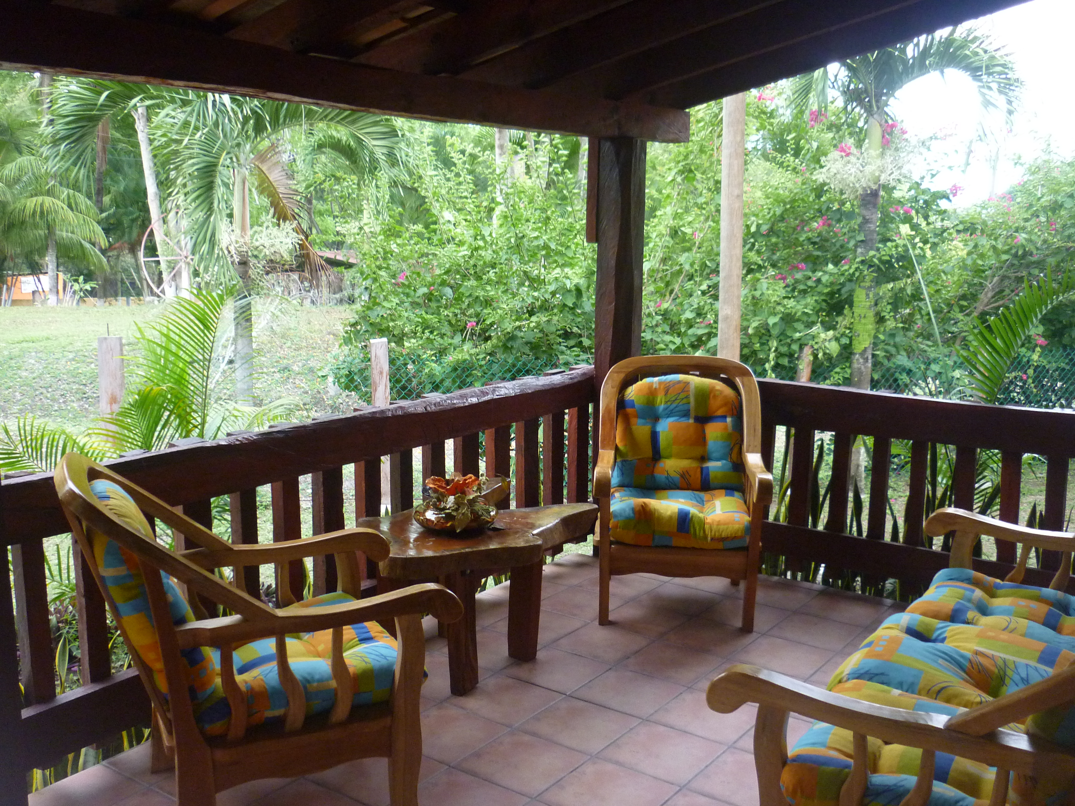 cabana